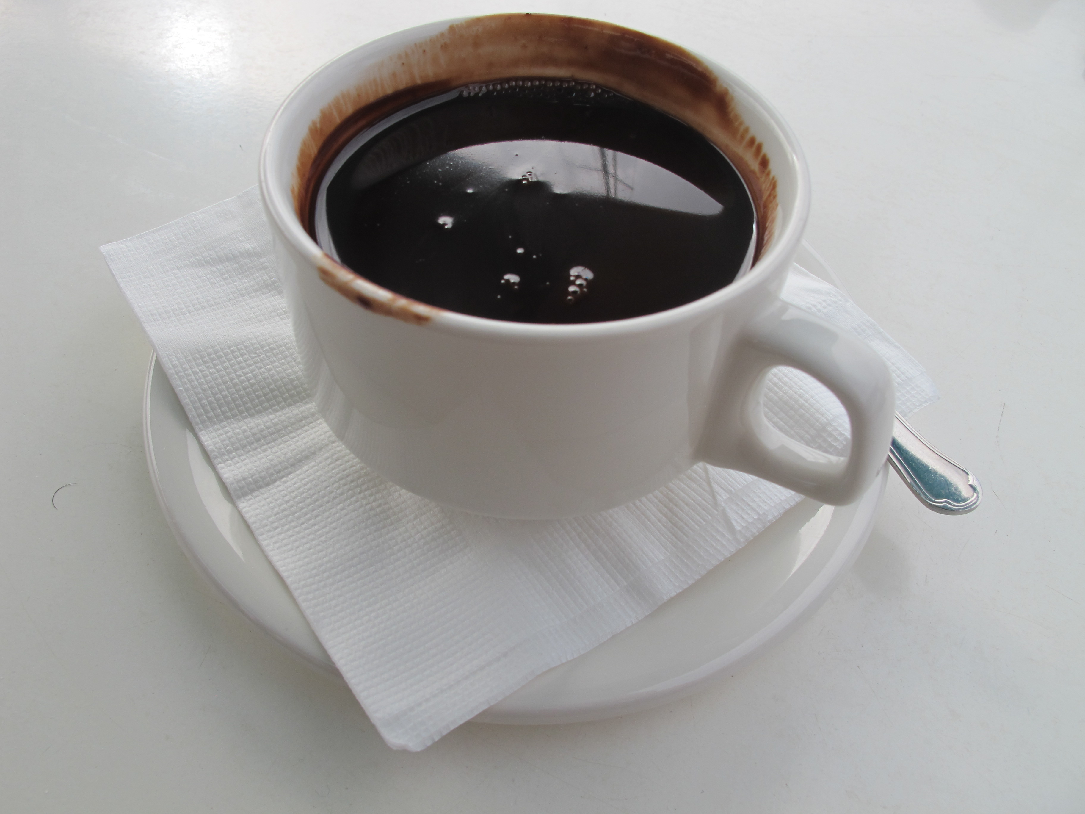 Heiße Schokolade im Yachthafen von Yasmine Hammamet